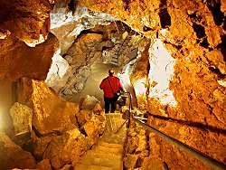 Kleine Halle, Laichinger Tiefenhöhle